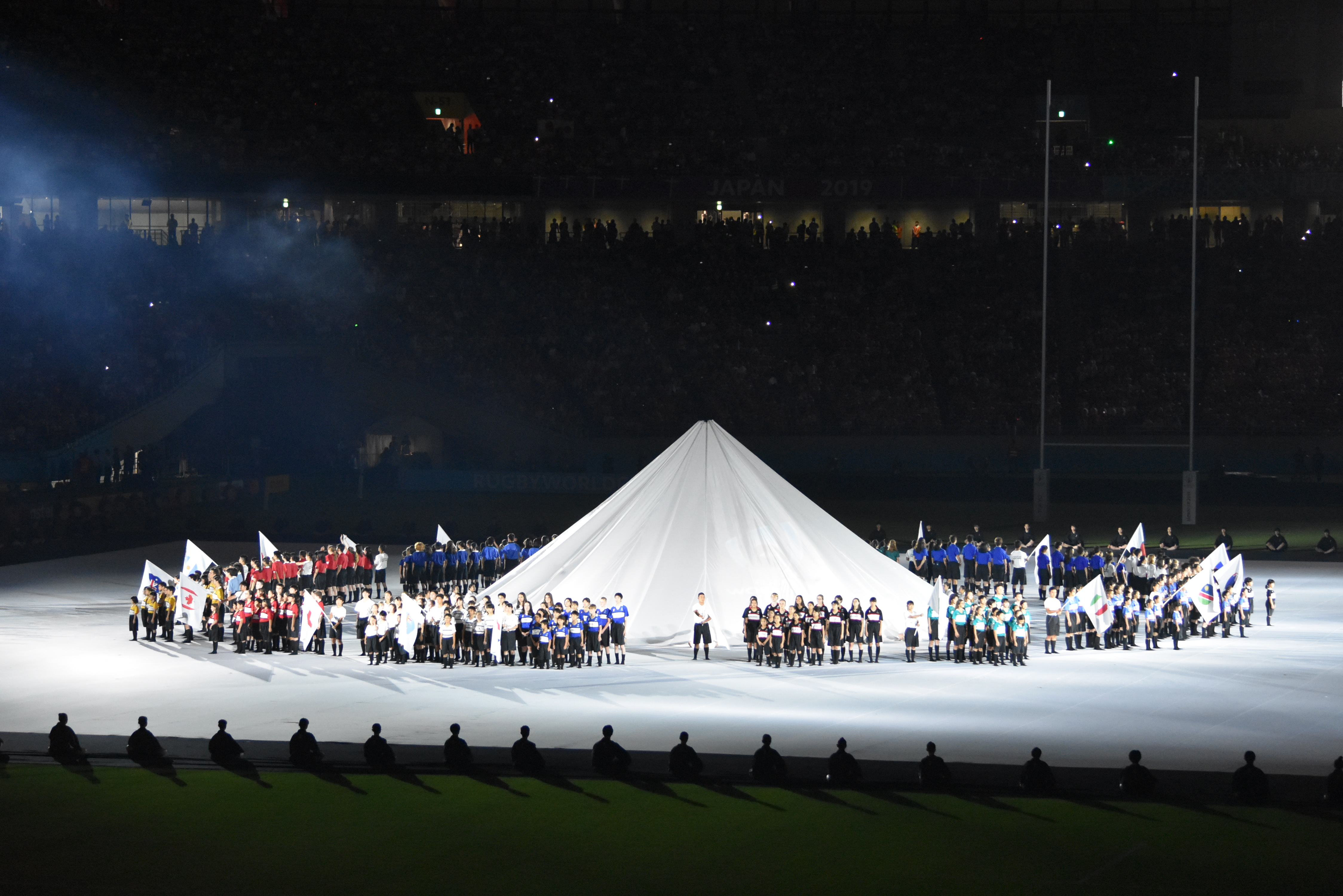 ラグビーワールカップ2019